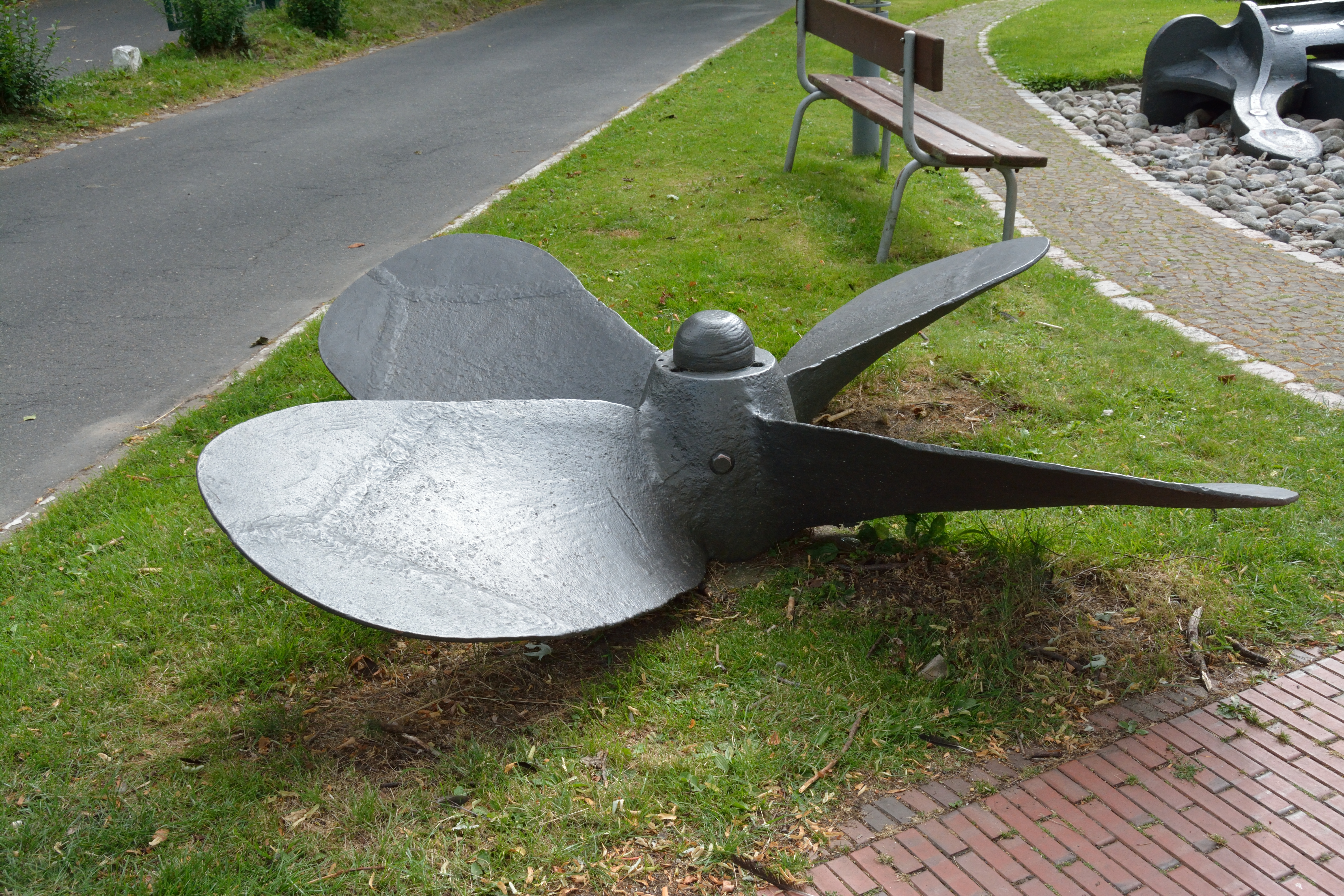 Brunsbüttel, am Schleusenmuseum Atrium